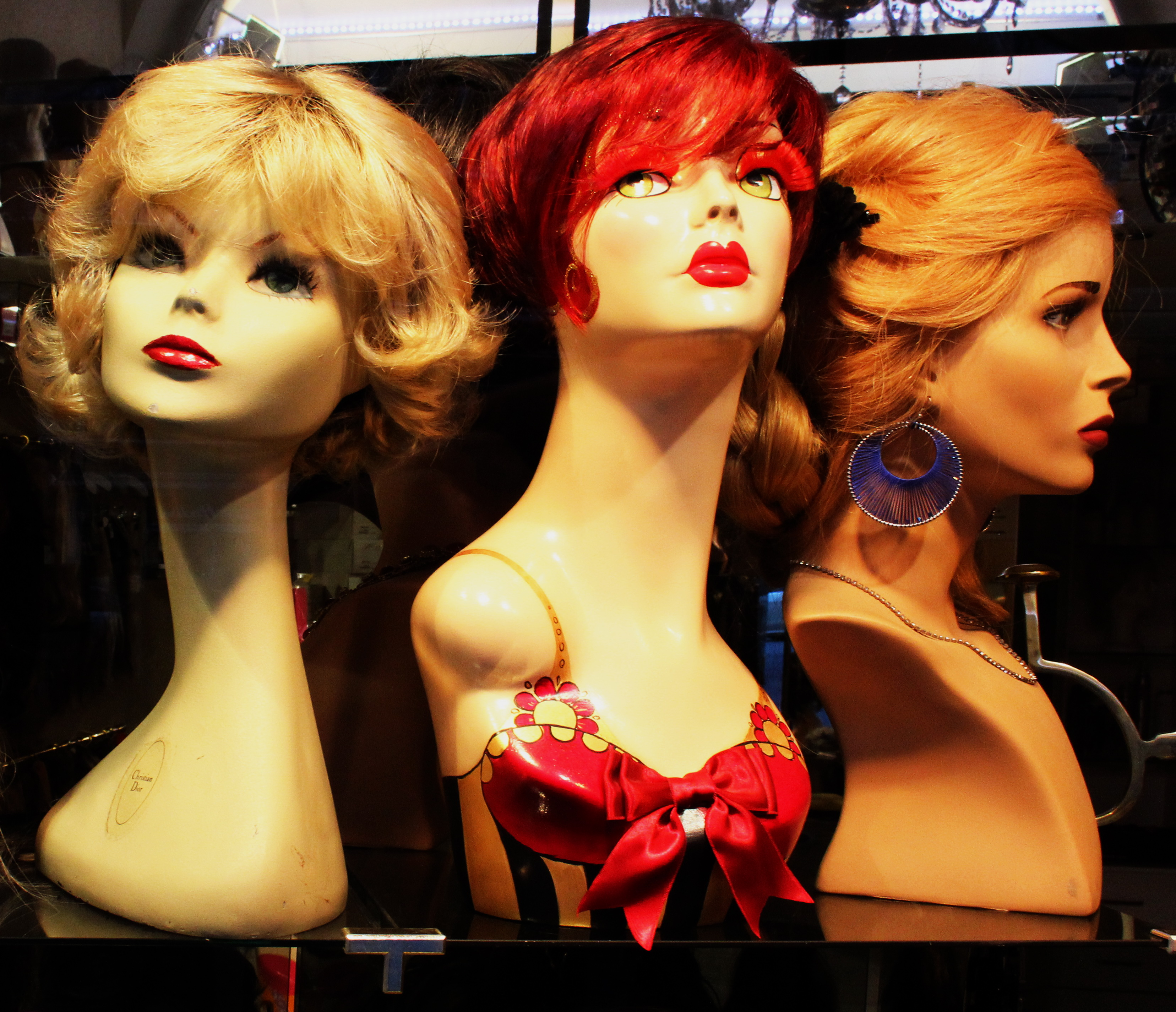 Perücken in einer Auslage.